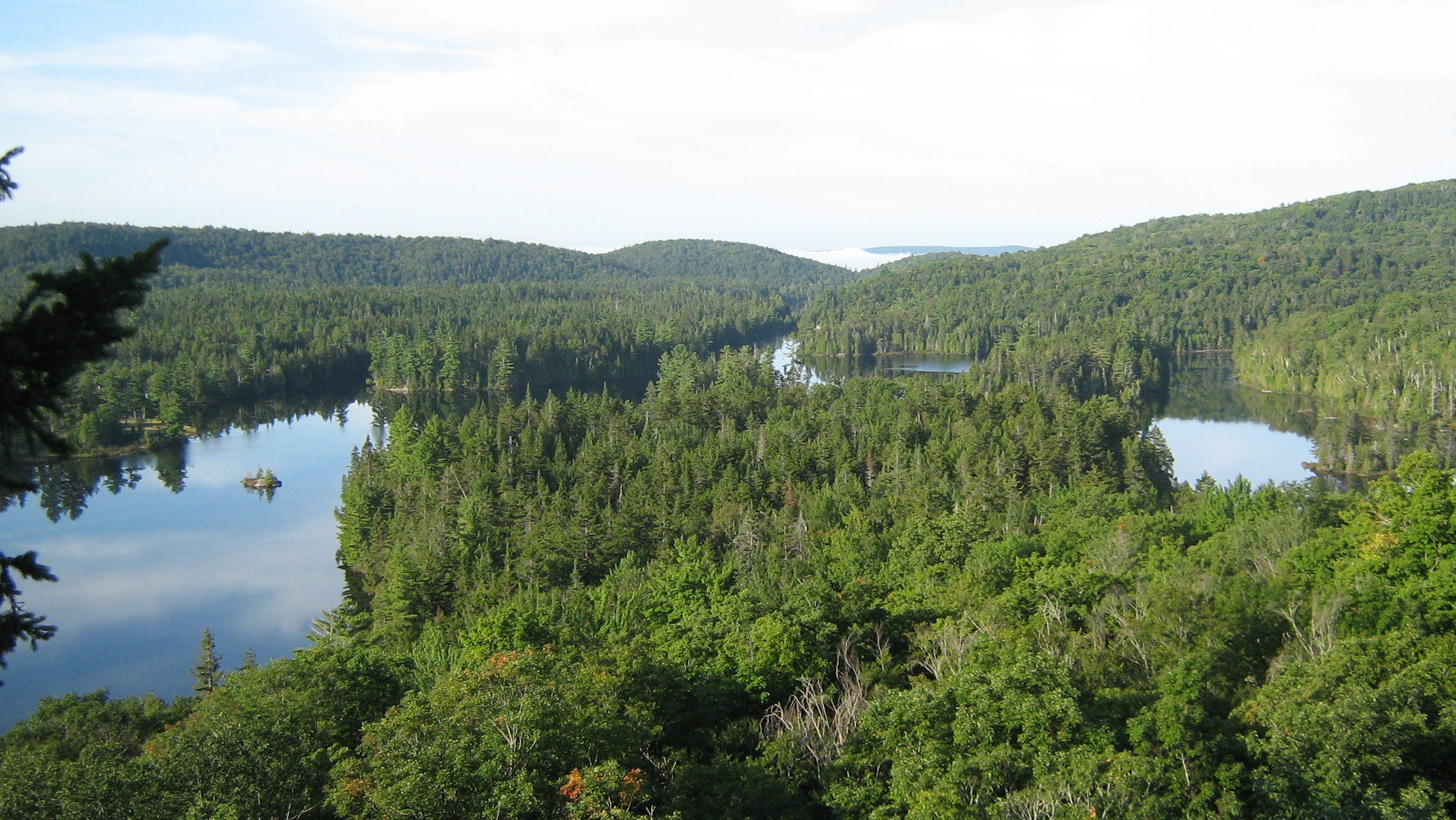 Lac des Îles à Grandes-Piles, vu du belvédaire du sentier Jacques-Buteux